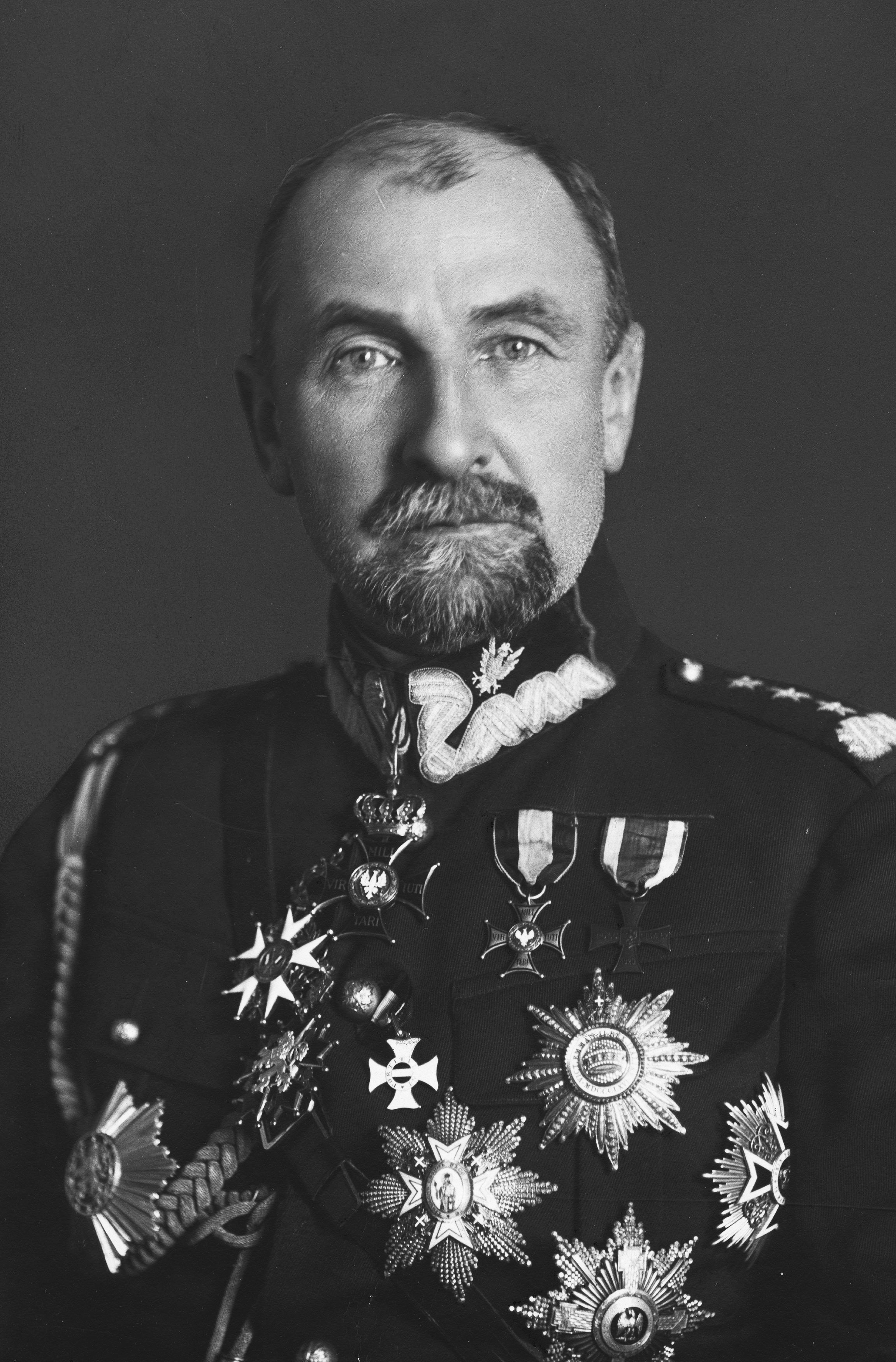 Tadeusz Jordan Rozwadowski herbu Trąby (1866–1928) – polski wojskowy, feldmarschalleutnant cesarskiej i królewskiej Armii, generał broni Wojska Polskiego, szef Sztabu Generalnego Wojska Polskiego w latach 1918 i 1920–1921.